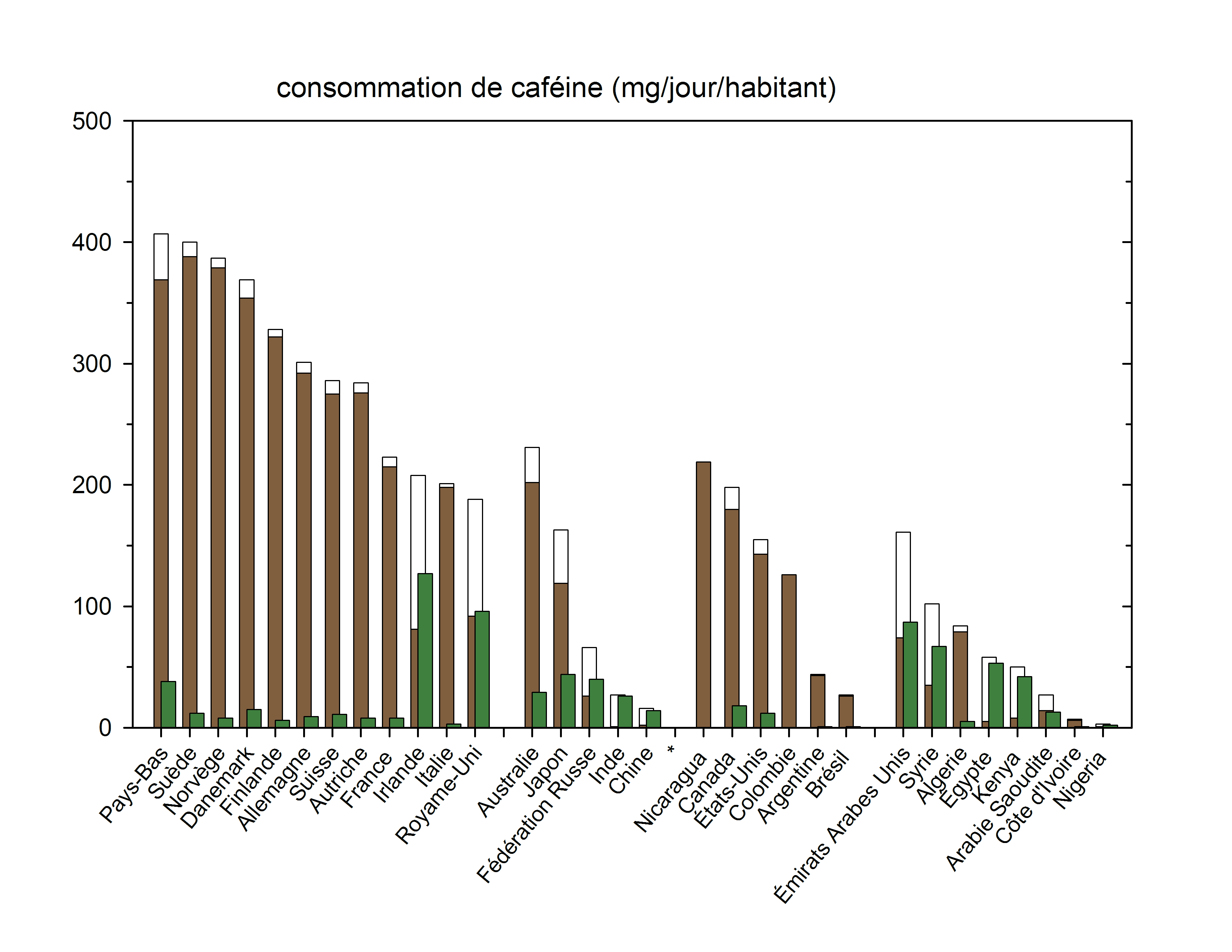 Consommation de caféine due au café et au thé par pays. valeurs tirées de "Actions of Caffeine in the Brain with Special Reference to Factors That Contribute to Its Widespread Use", Fredholm et al., Pharmacological Reviews, Vol. 51, Issue 1, 83-133, March 1999